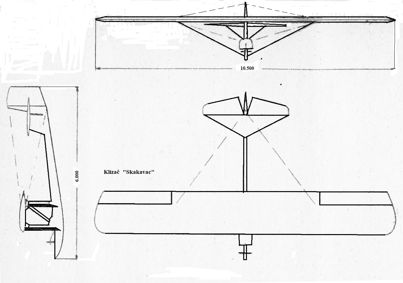 Српски (ћирилица): Klizač za počenu obuku jedriličara